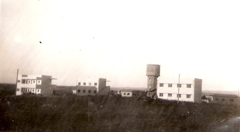 Kvuzat Mishmarot View, 1937